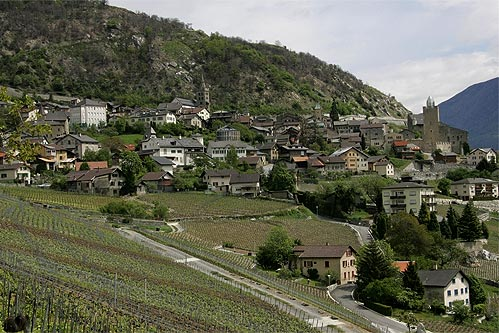 Leuk-Stadt (Gemeinde Leuk)